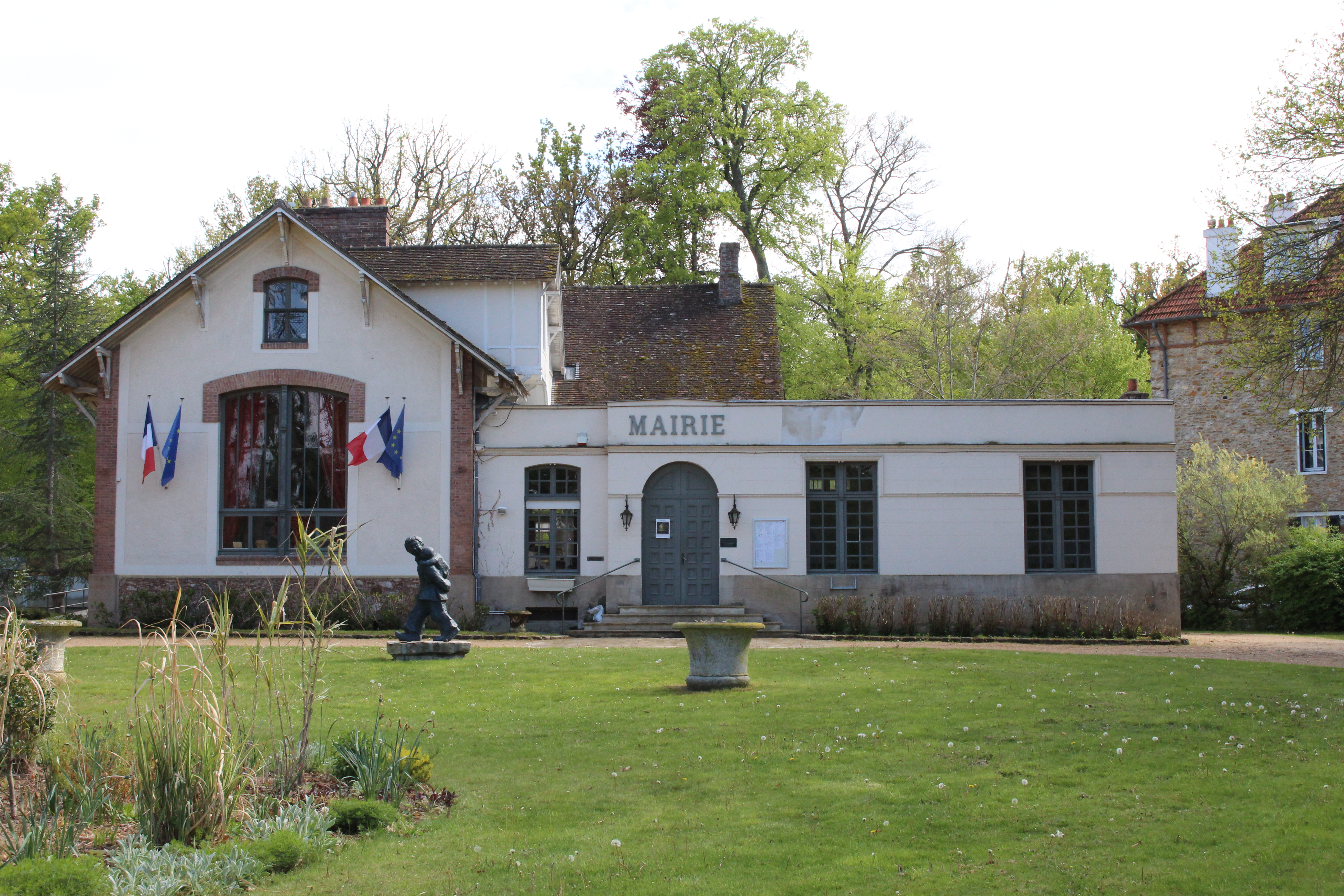 Mairie de Barbizon.